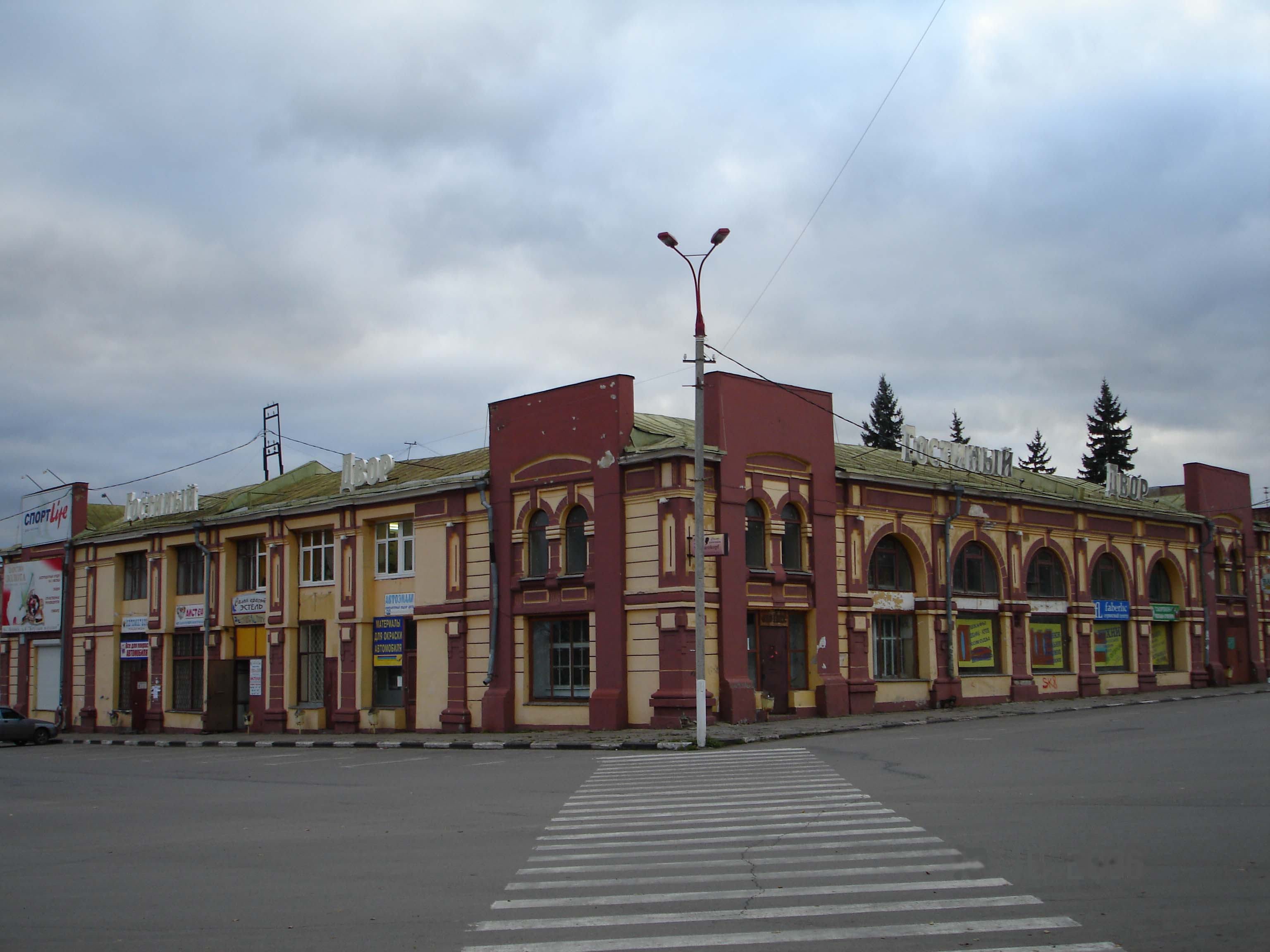 Площадь Ленина (Серпухов) Исторический центр города. Площадь Ленина, ранее бывшая главной торговой плащадью. Здание Гостиного двора Категория:Серпухов